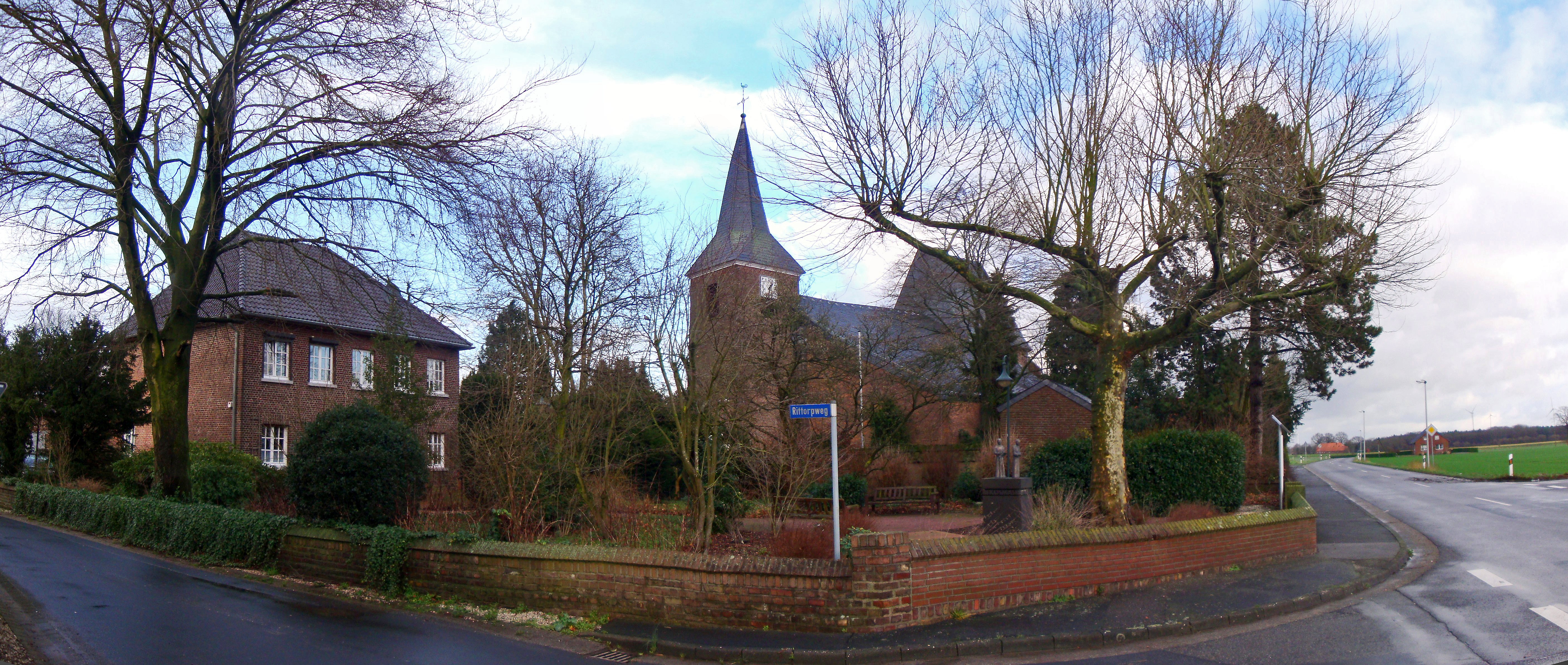 Chor der Pfarrkirche Ende des 15. Jahrh., Turm von 1774, Langhaus aus dem 19. Jahrh.